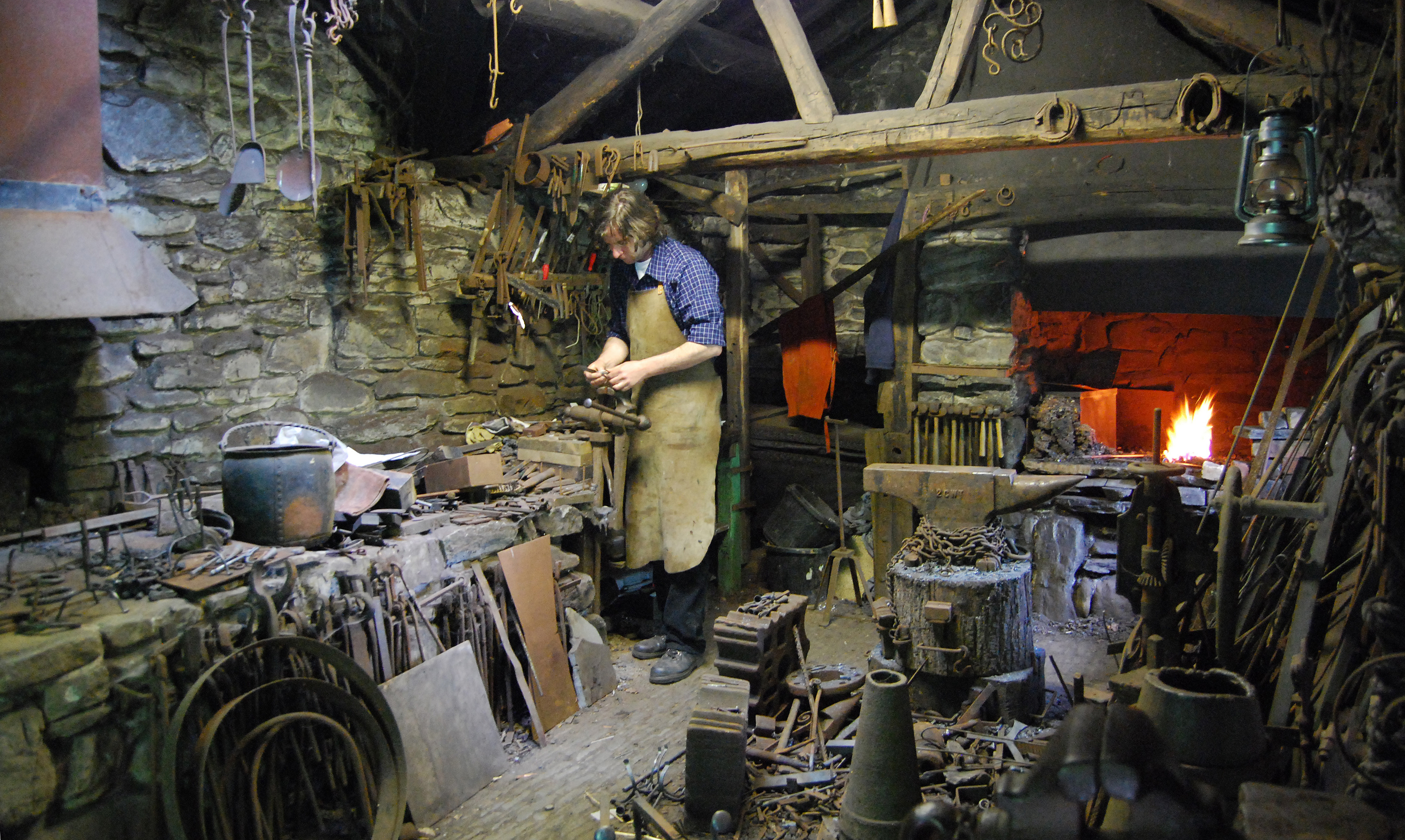 walesi skanzenban kovácsműhely